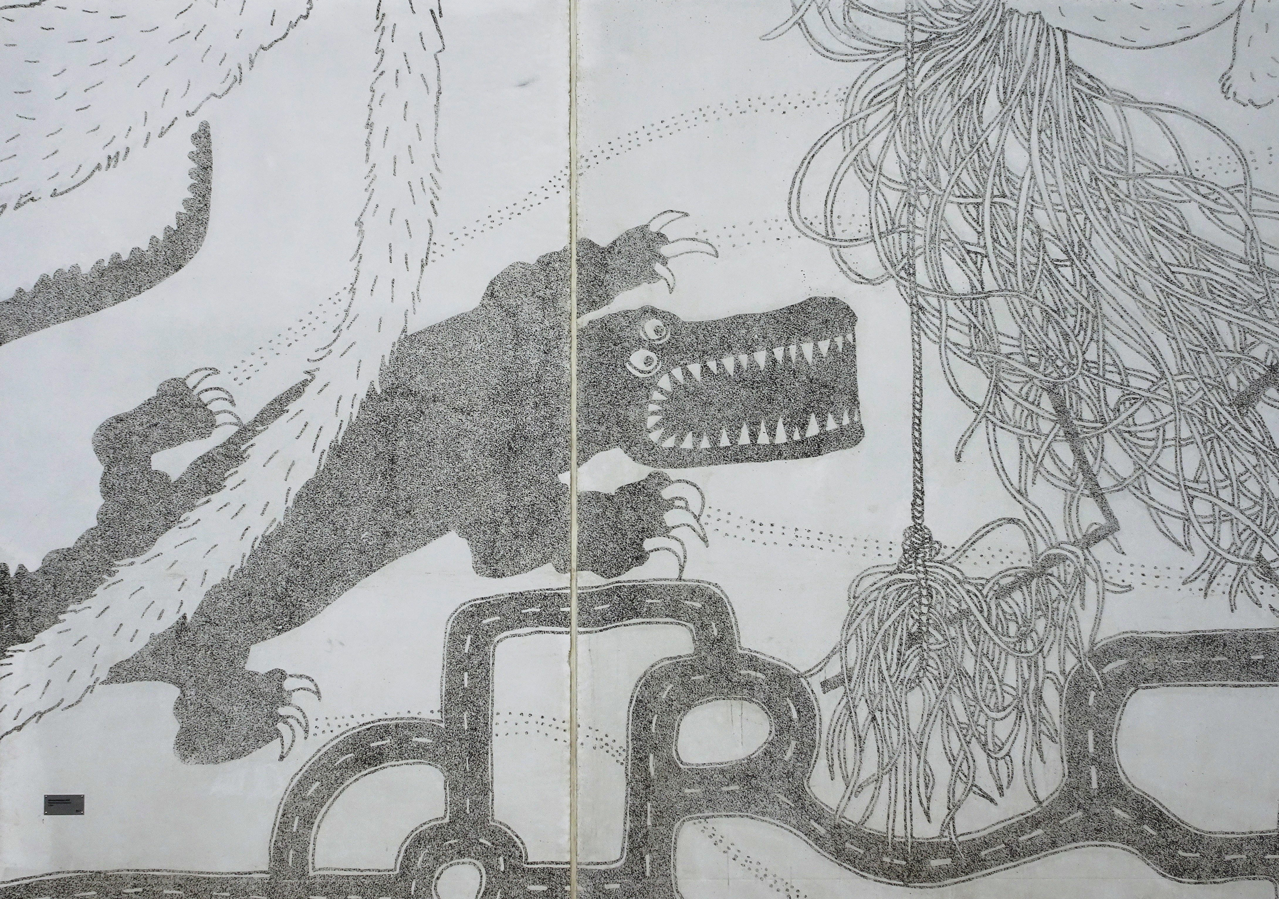 Långbrodalsskolan tillbyggnad, arkitekt Aperto/Niras arkitekter, gavelutsmyckning av Rebecka Bebben Andersson